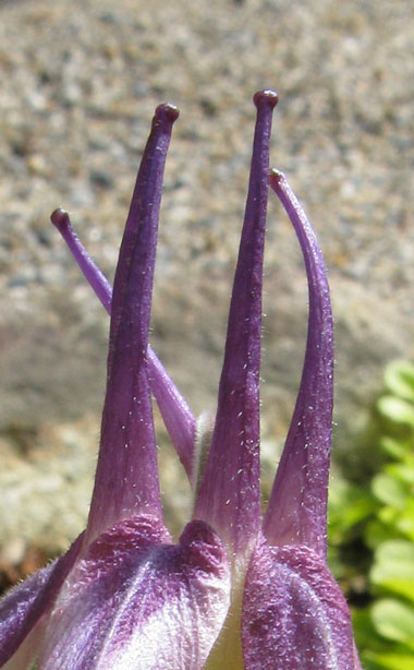 Détail des éperons de la fleur de Aquilegia x maruyamana.